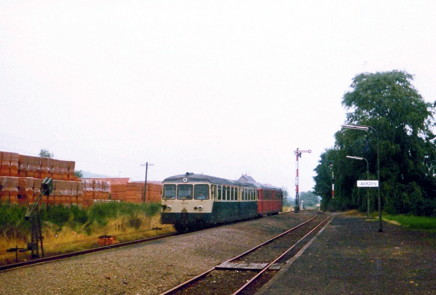 ETA150 im Bahnhof Aerzen, Ende der siebziger Jahre